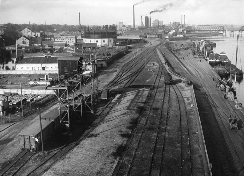 Tilsit (Ostgebiete des Deutschen Reiches unter fremder Verwaltung) Tilsit entstand im 15. und 16. Jahrhundert in Anlehnung an eine 1406 erbaute Ordensburg. Die preussisch-deutsche Geschichte ist mit diesem Namen eng verknüpft. Dorthin floh die preussische Königsfamilie vor Napoleon, wo Königin Luise mit ihm zusammentraf. 1807 wurde hier der Friede geschlossen. Tilsit, an der Memel und der Eisenbahnlinie Insterburg - Memel gelegen, entwickelte sich zu einem ansehnlichen Umschlaghafen, hatte Maschinnbau und landwirtschaftliche Industrien (Tilsiter Käse). Durch die Abtrennung des Memelgebietes 1919 erlitt die Stadt schweren wirtschaftlichen Schaden. Seit 1945 steht die teilweise zerstörte Stadt unter sowjetrussischer Verwaltung. [Aufnahme 1930er Jahre]